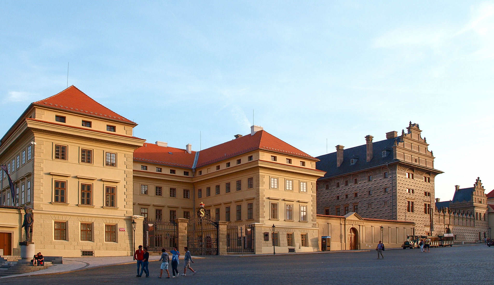 Salmovský a Švarcenberský palác